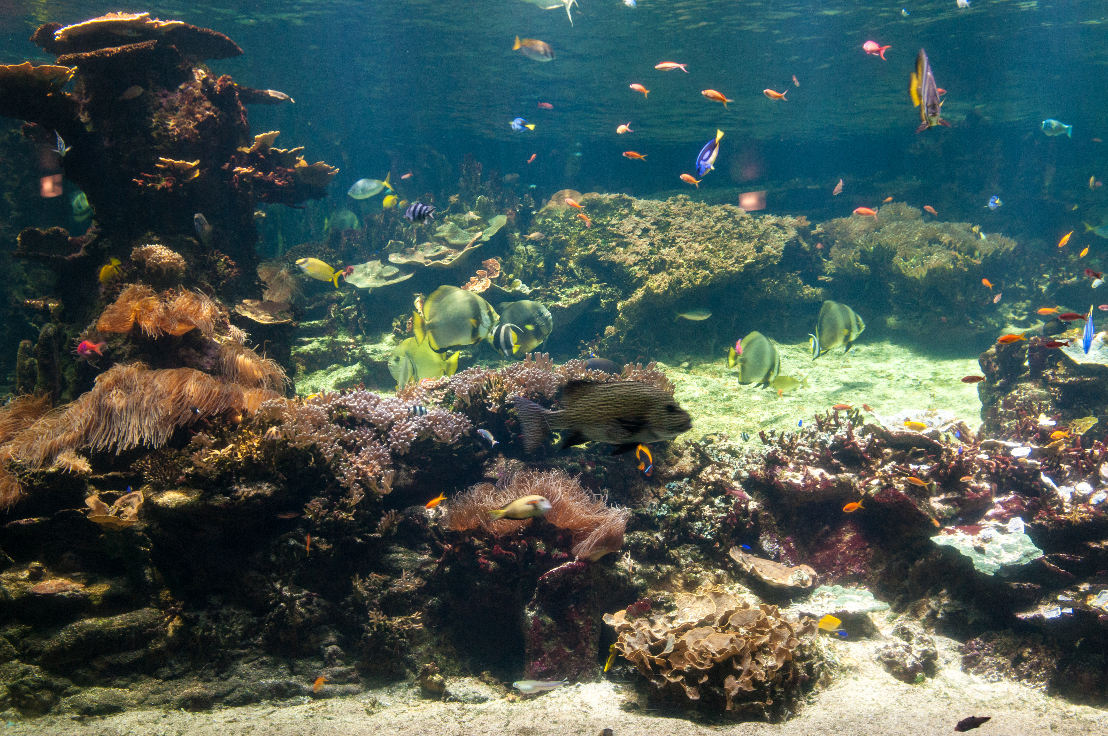 In Nausicaá Centre National de la Mer in Boulogne-sur-Mer